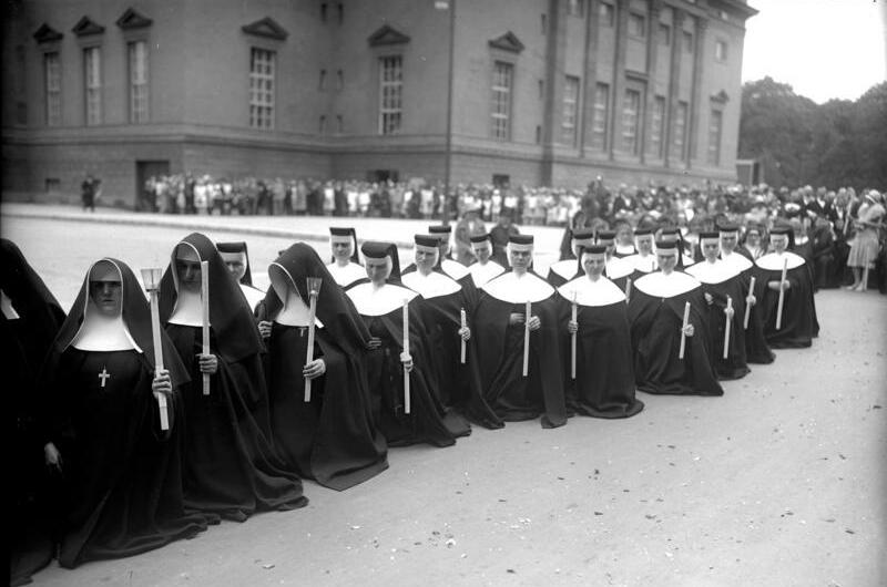 Die feierliche Fronleichnam-Prozession an der Hedwigskirche in Berlin ! Knieende Nonnen im Gebet vor der Hedwigskirche während der Fronleichnam-Prozession.